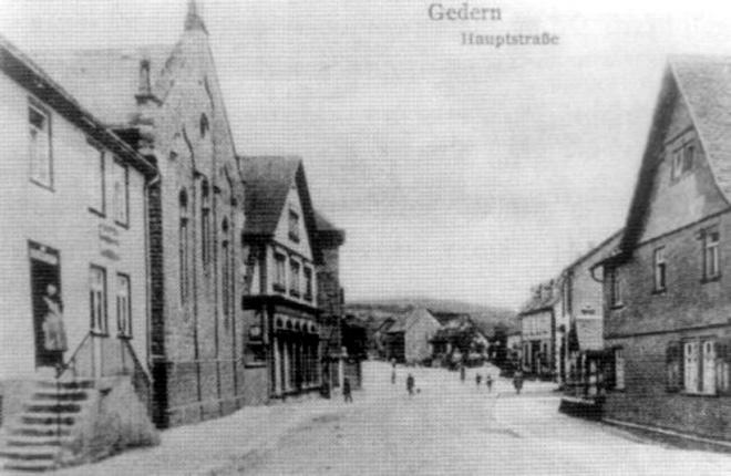 Ansichtskarte mit der früheren Hauptstraße, heute Lauterbacher Straße, in Gedern